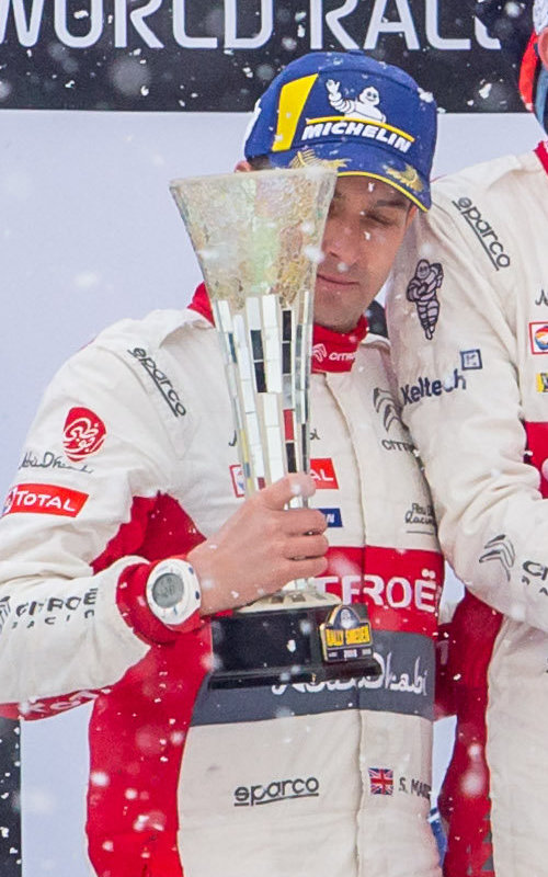 Podium Rajdu Szwecji 2018